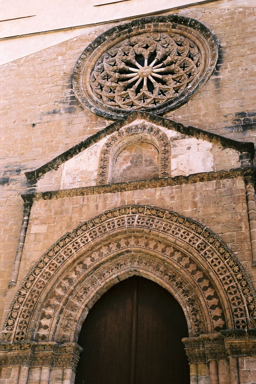 Sant'Agostino, Palermo Portico and rosette